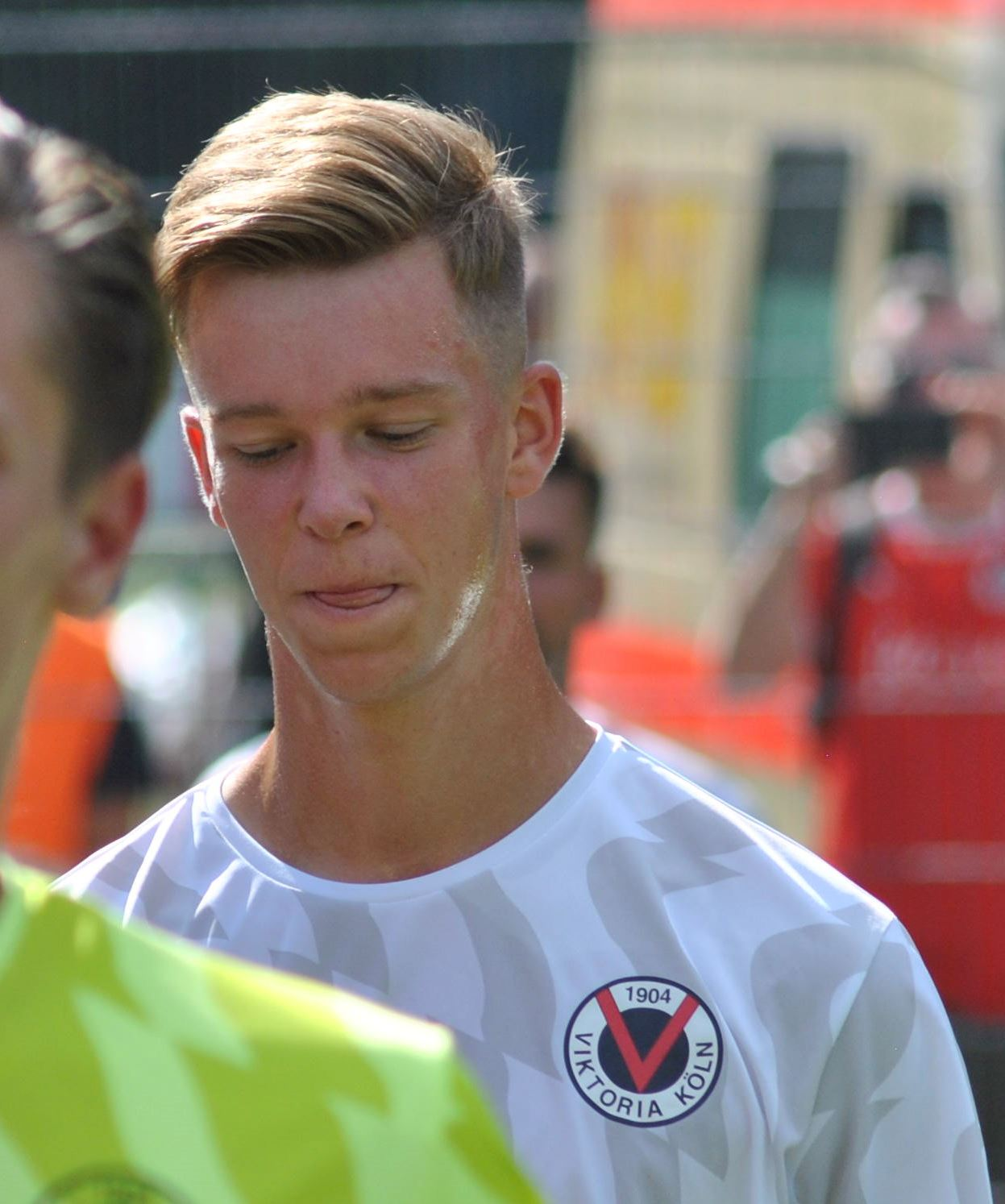 Dario de Vita (Viktoria Köln) am 31.08.2019 nach dem Spiel gegen Ingolstadt